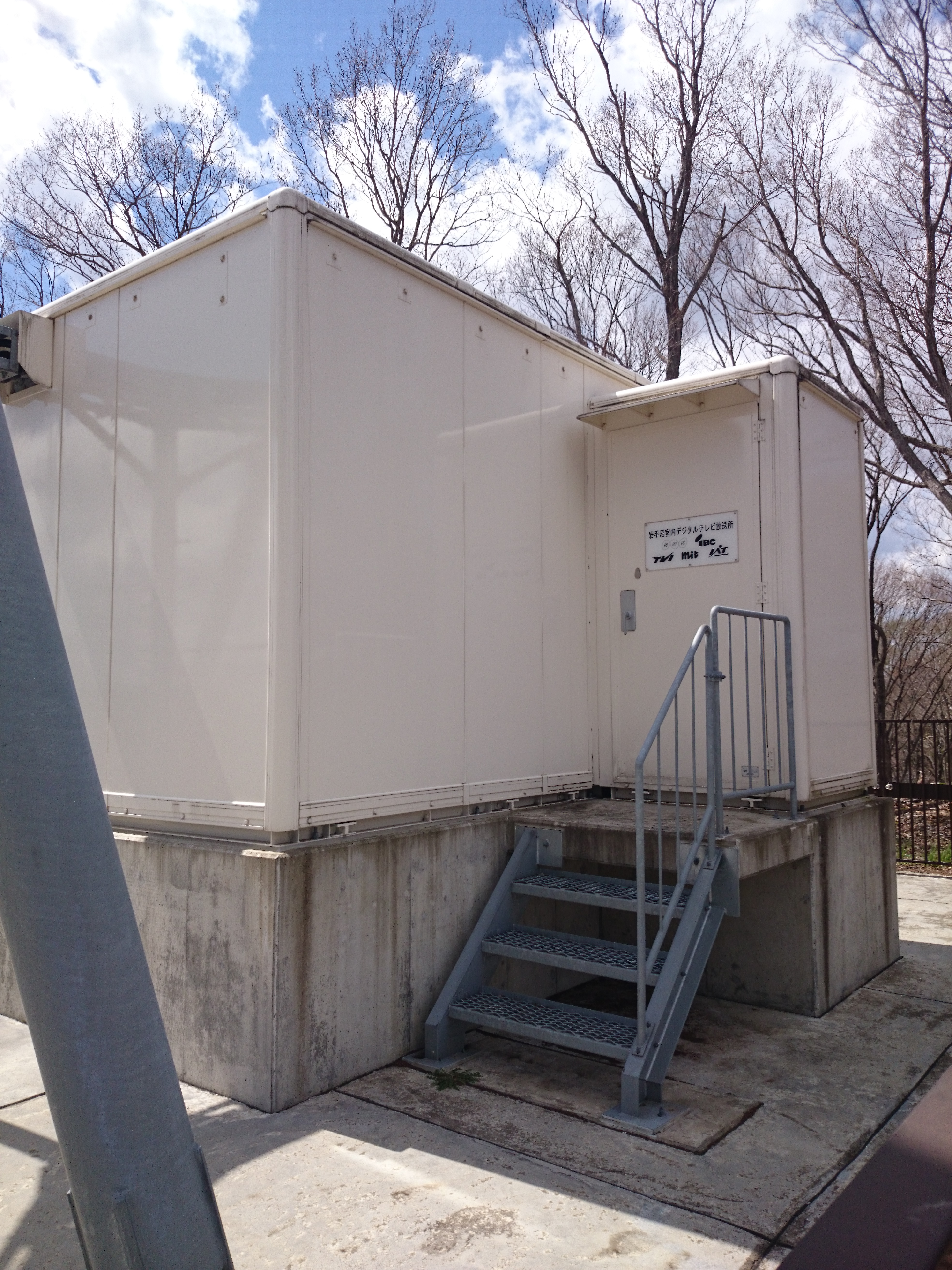 岩手沼宮内テレビ中継局2